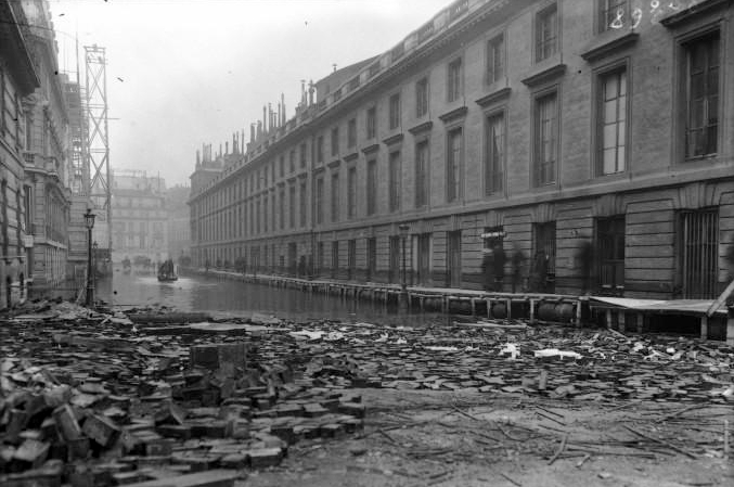 Inondations de Paris, 4 février 1910. Rue de Bourgogne.